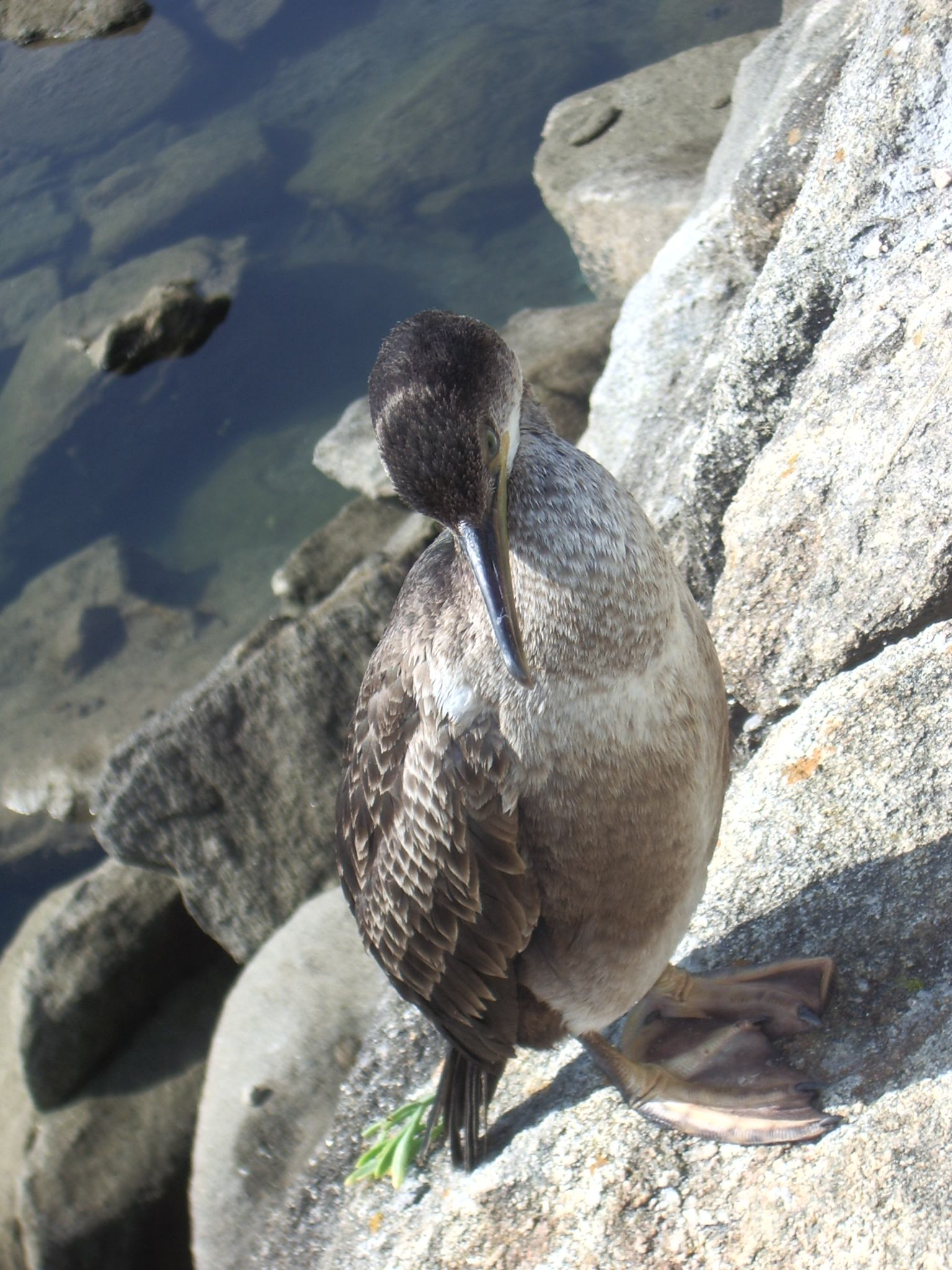 Cormorán moñudo (Phalacrocorax aristotelis) en las Islas Cíes